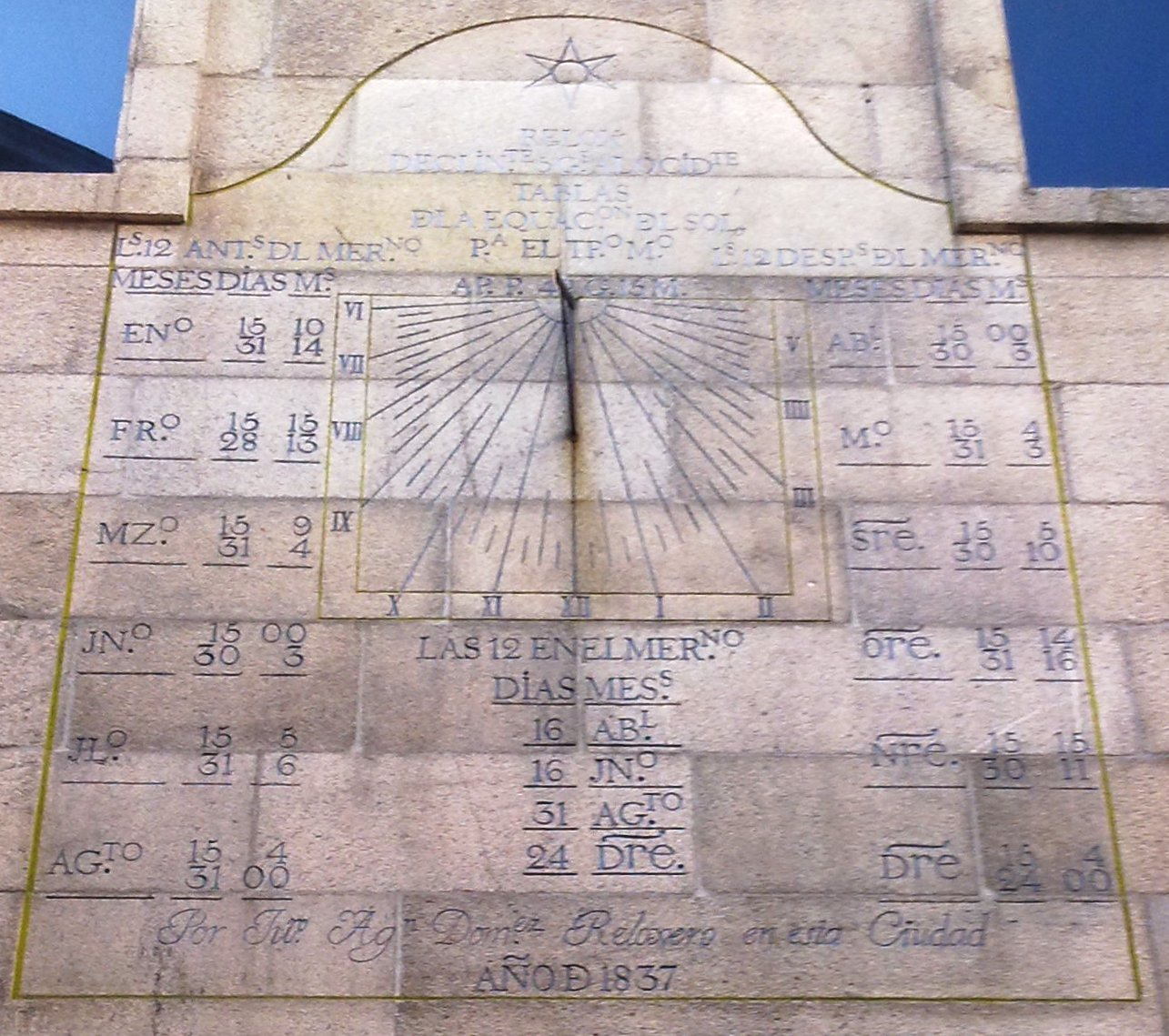 Reloj de sol situado en uno de los laterales de la Iglesia Colegiata de Santa María en Vigo. Concretamente, el reloj se encuentra en el lado sur del edificio.